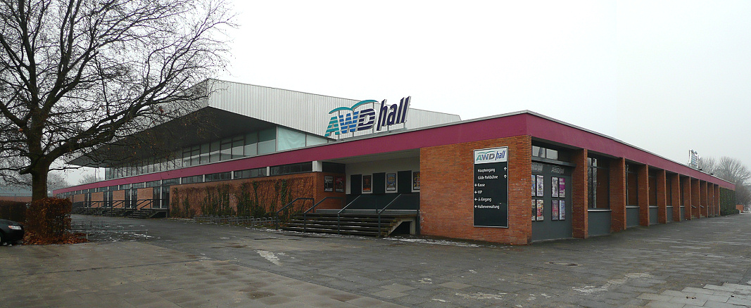 AWD Hall Hannover